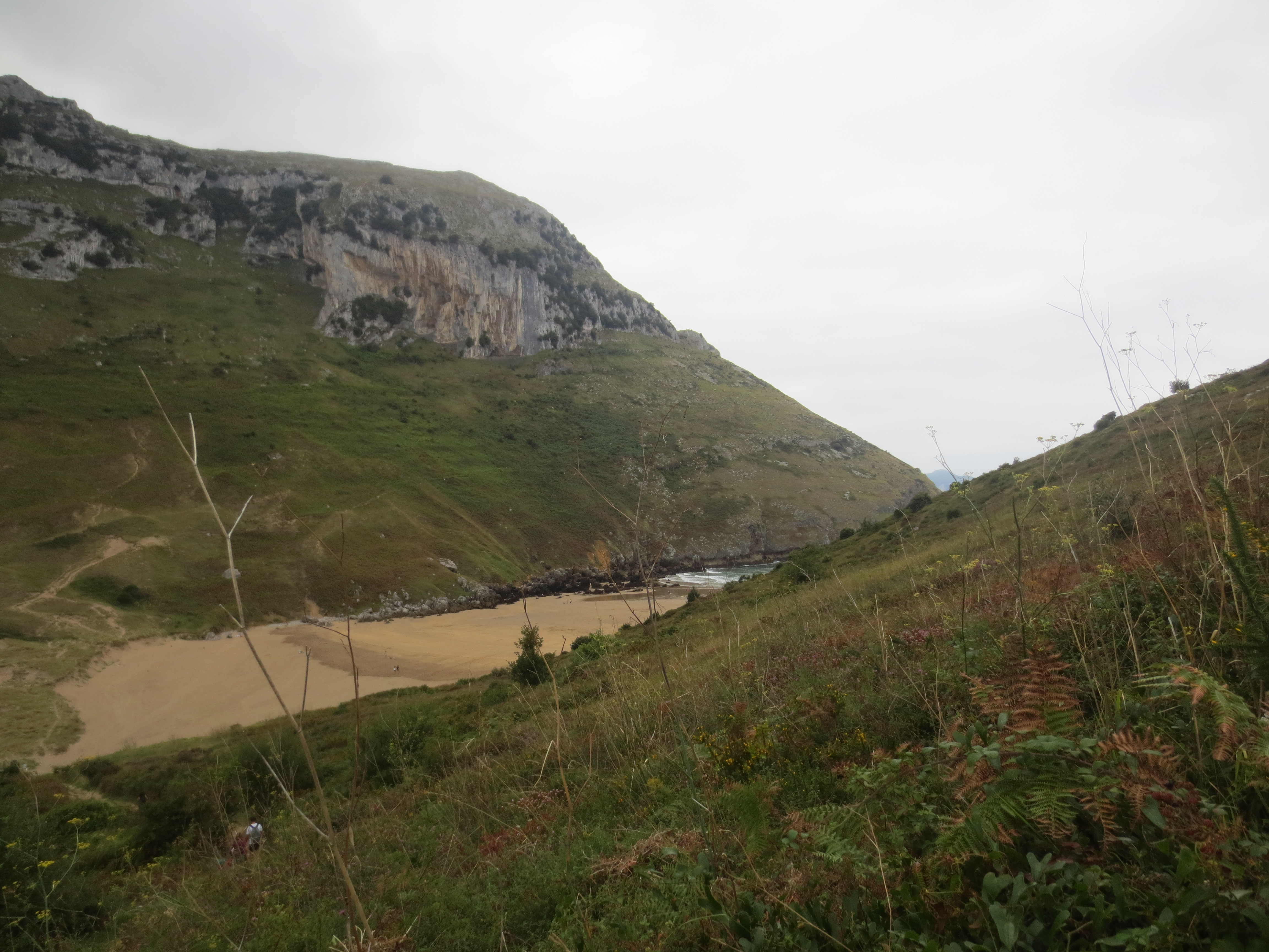 Sonabia hondartza. Kantabria.